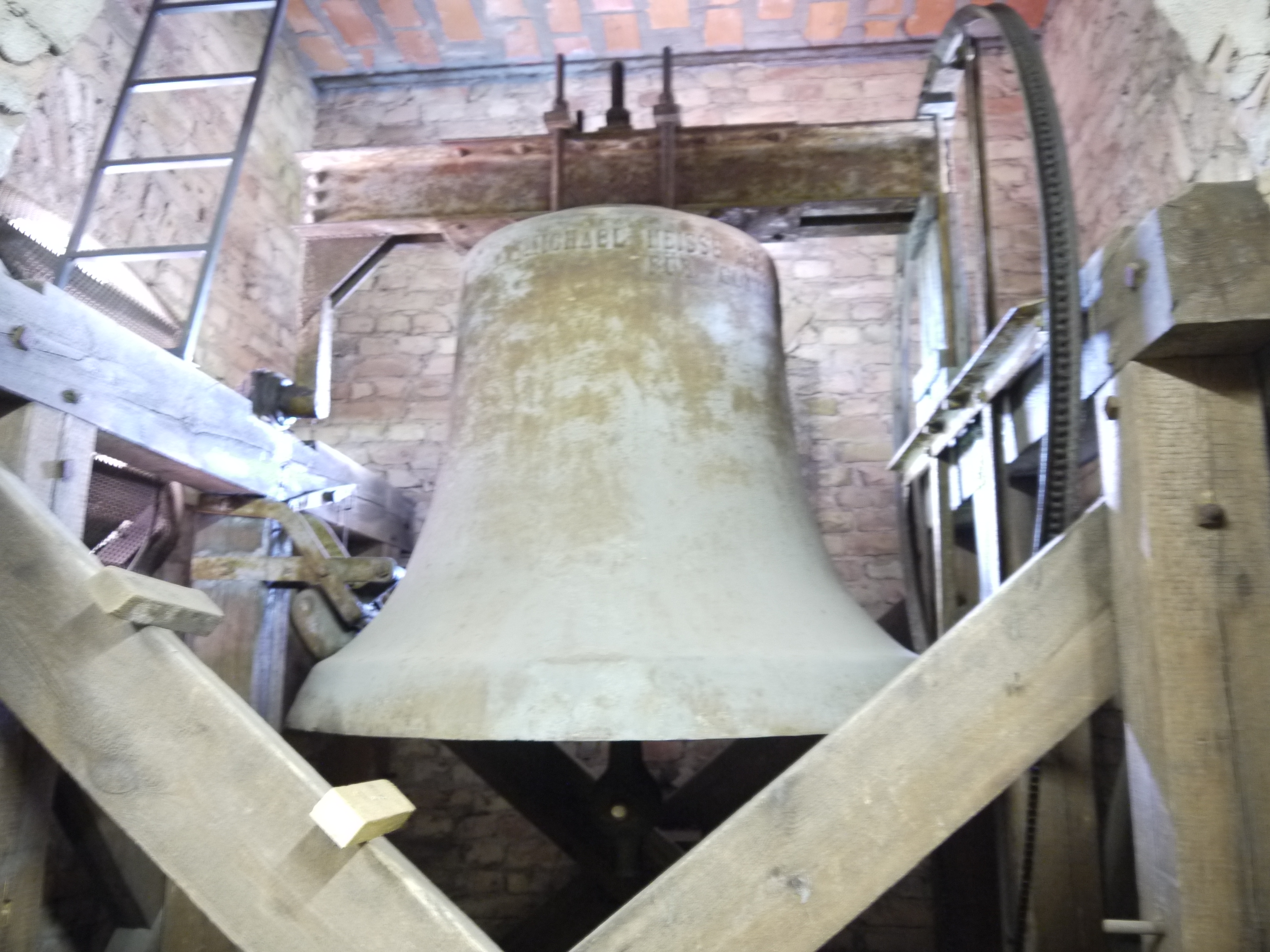 Die alte Michaelsglocke der katholischen Pfarrkirche St. Elisabeth in Königs Wusterhausen.